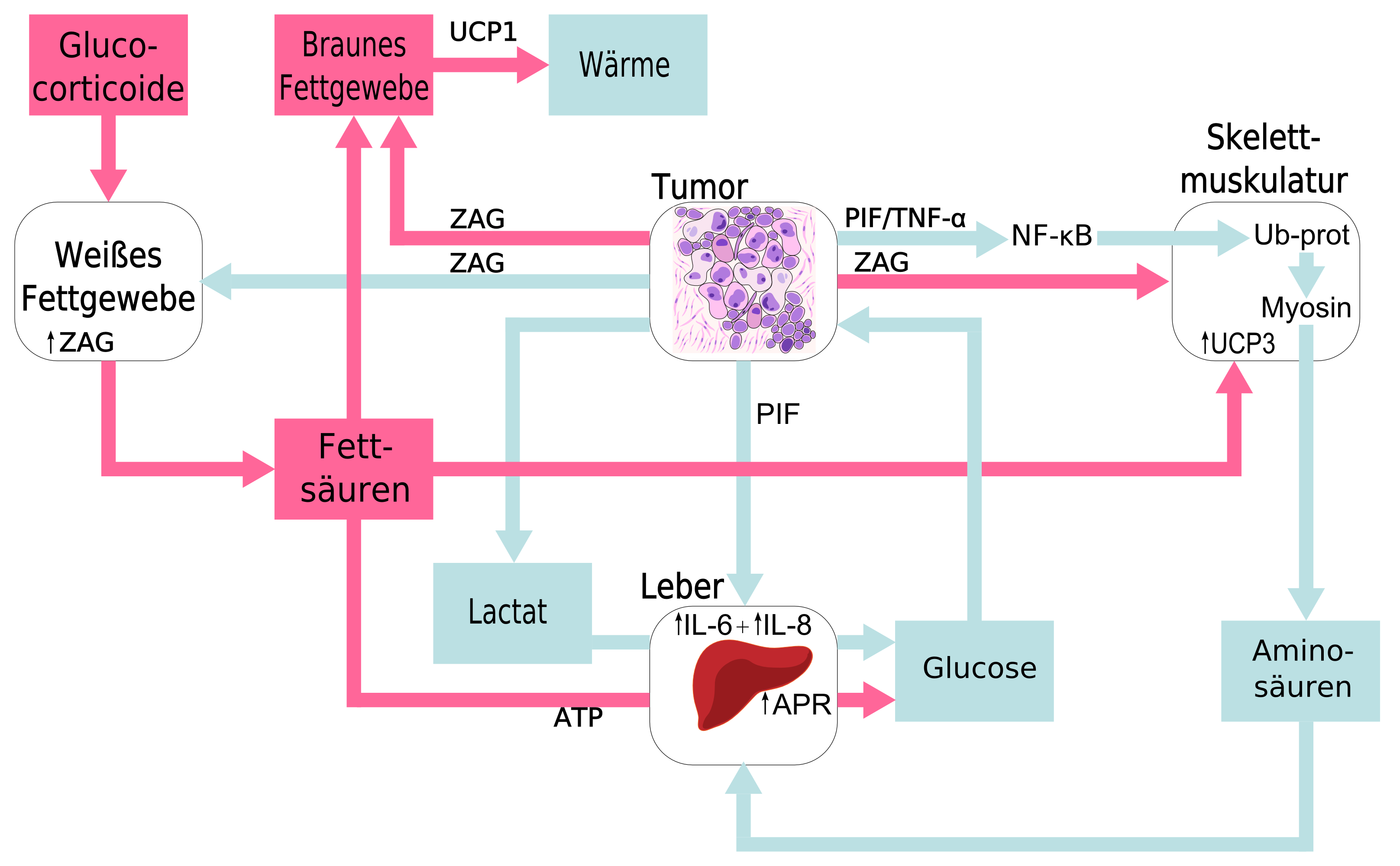 Die Interaktion zwischen Tumor und gesundem Körpergewebe bei der Tumorkachexie. ZAG: Zink-α2-Glycoprotein (AZGP1) PIF: Proteolyseinduzierender Faktor APR: Thermogenin) UCP3: Uncoupling Protein 3 IL-6: Interleukin-6 IL-8: Interleukin-8 ATP: Adenosintriphosphat Ub-prot:de:Ubiquitin-Proteasom-System TNF-α: Tumornekrosefaktor NF-κB. NF-κB nuclear factor 'kappa-light-chain-enhancer' of activated B-cells